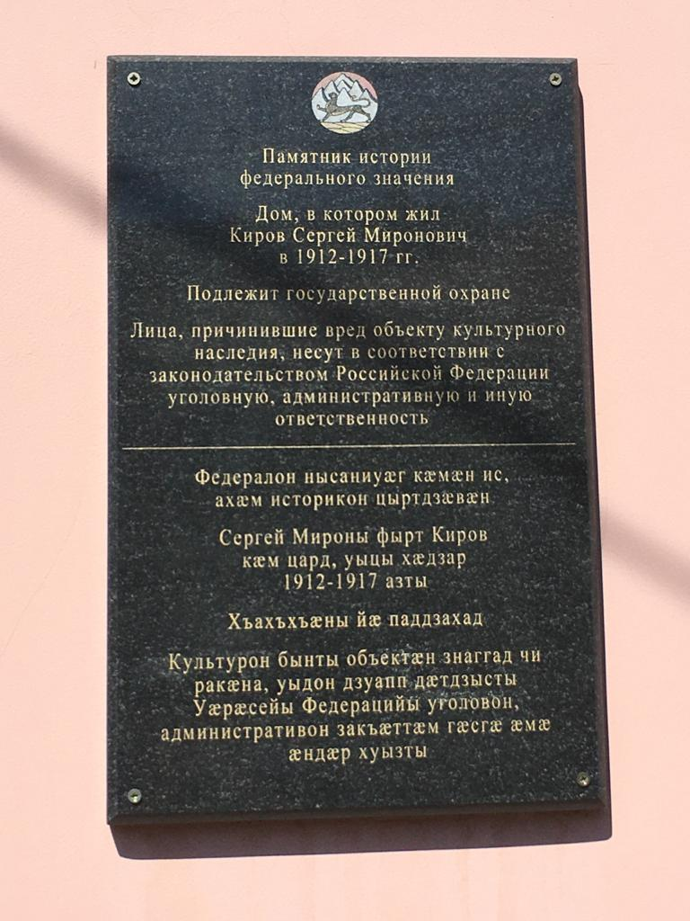 Дом, где в 1912-1921 гг. жил революционер Киров С.М.: переулок Вахтангова, 9, Владикавказ, Северная Осетия